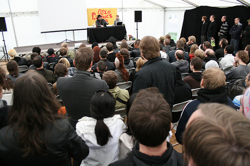 Norsk (bokmål): Espen Jørgensen intervjuer den britiske tegneserieskaperen Warren Ellis på Oslo Comics Expo i 2008.